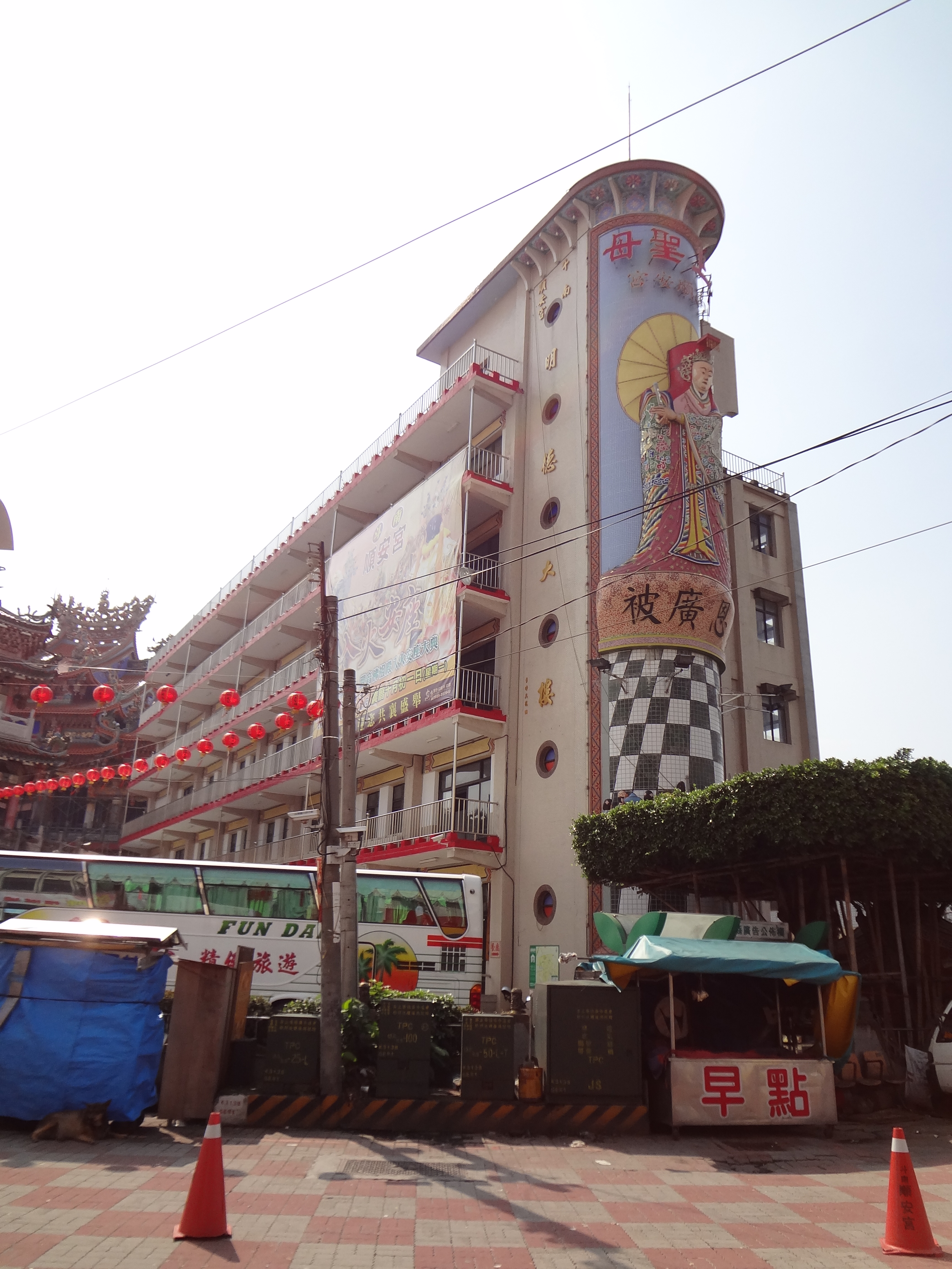 臺灣雲林縣斗南鎮斗南順安宮明德大樓。